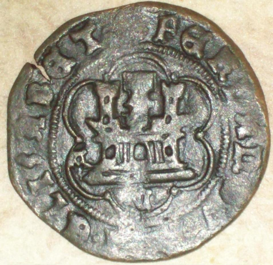 Fotografía Moneda 4 Maravedís de los Reyes Católicos acuñada en Cuenca